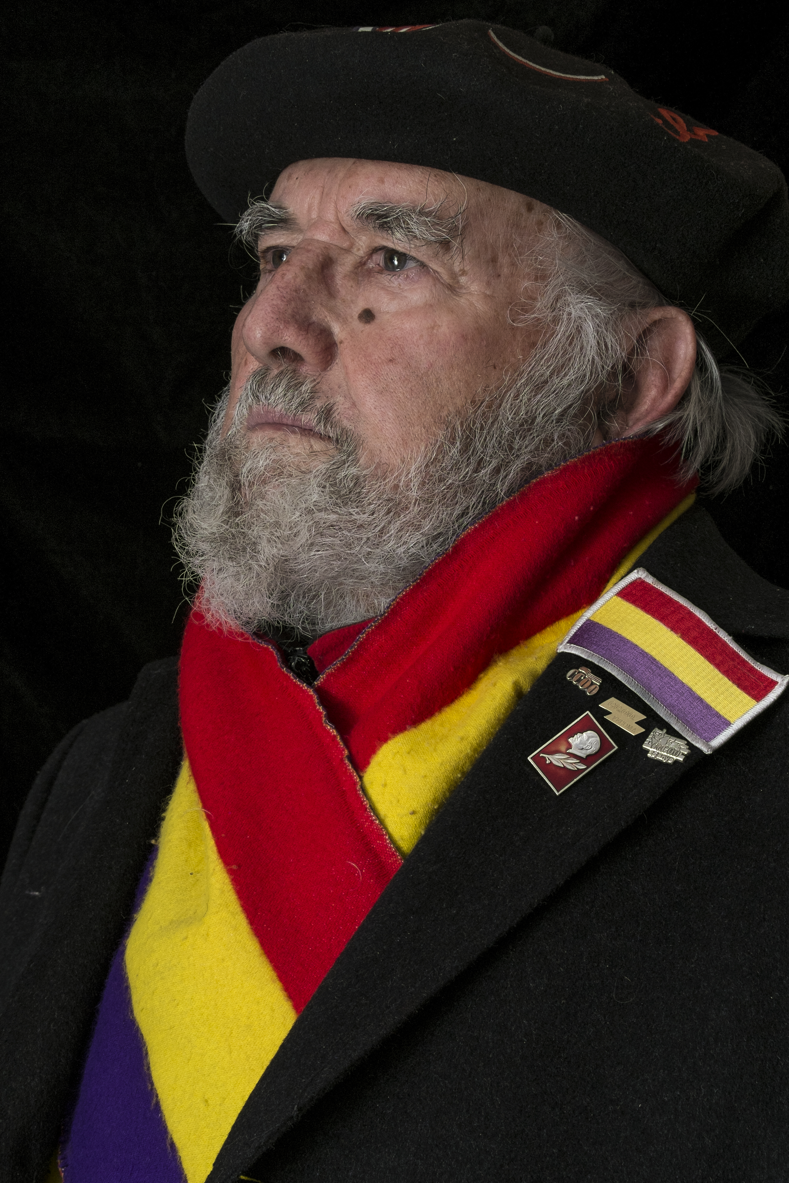 Antonio Chacón Jiménez, a la edad de 82 años.